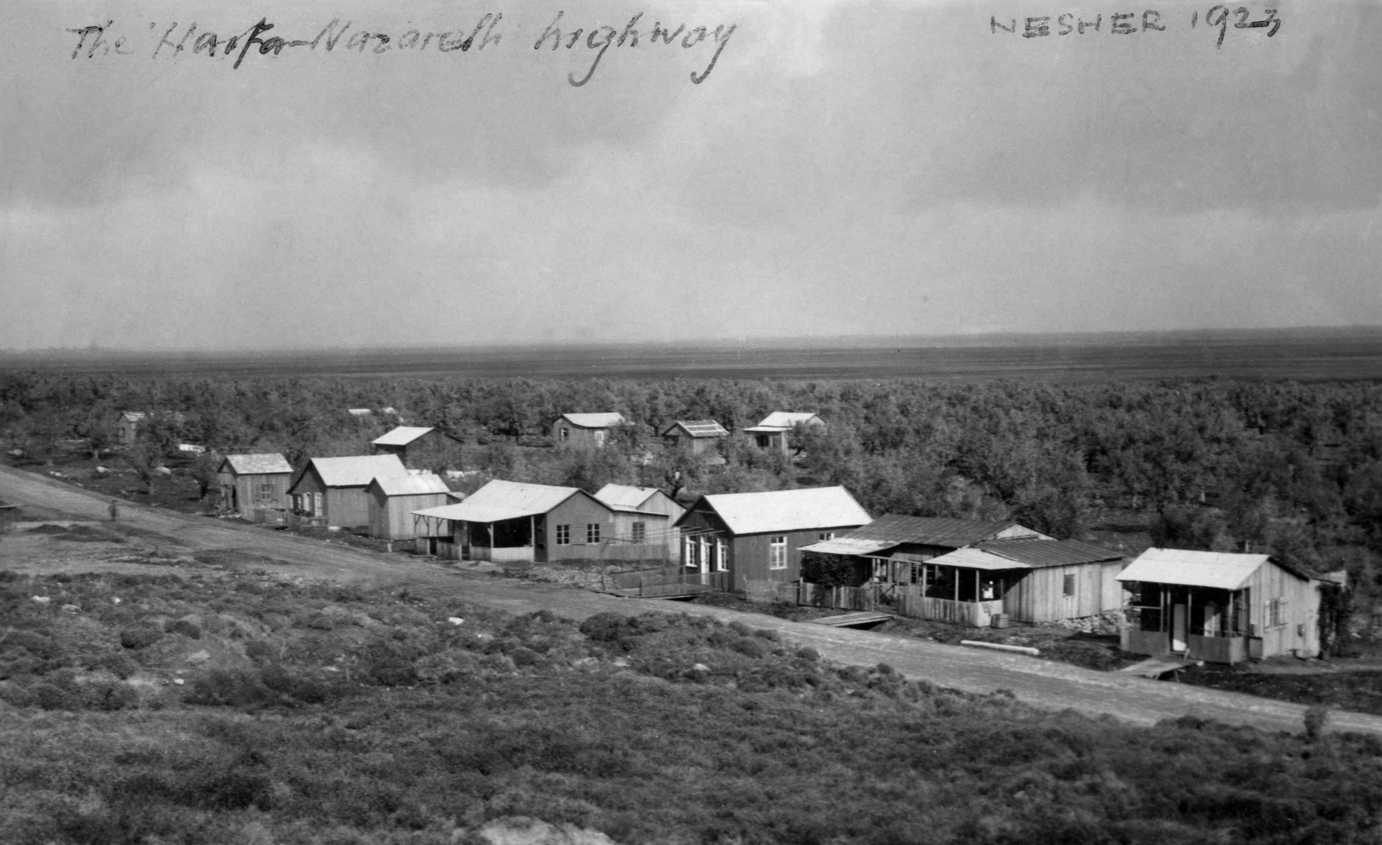 הצריפים הראשונים של פועלי בית החרושת נשר שנבנו לצד כביש חיפה-נצרת, היום כביש 752 העובר במרכז שכונת נשר הוותיקה מול כיכר ההסתדרות של היום. התמונה צולמה על ידי בלה שניטלנדר שהיה מהמהנדסים הראשונים של בית החרושת נשר מקורה של התמונה מאוסף נעמי קרוזו בתו של בלה שניטלנדר כאן